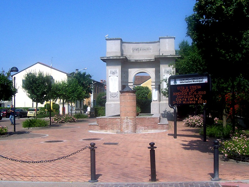 Grezzago - Monumento ai Caduti